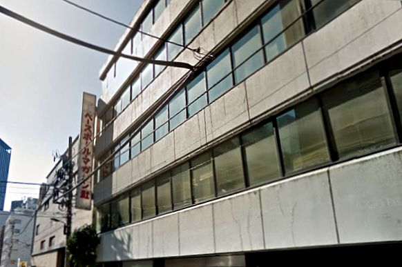 ベースボールマガジン社社屋